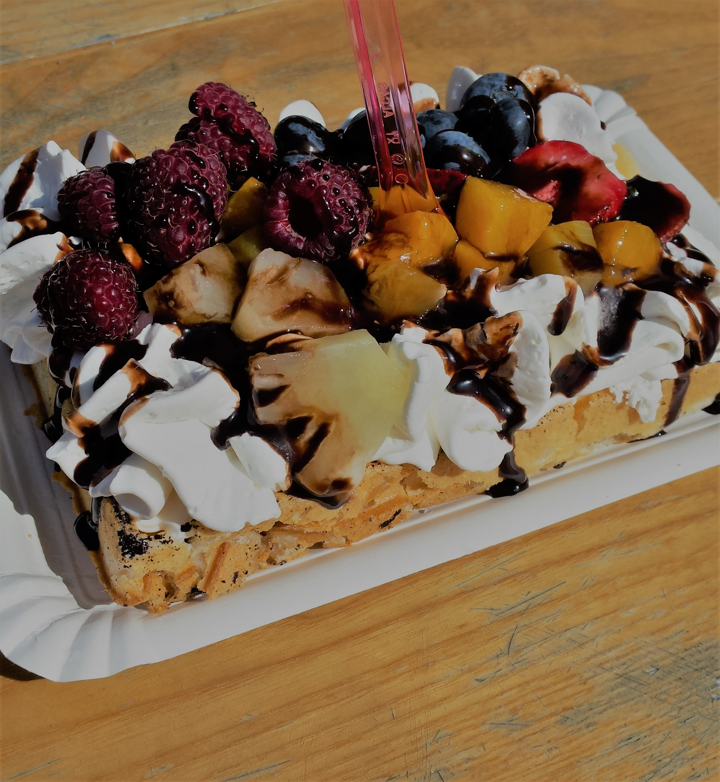 Zdjęcia przedstawia przykład produktu typu comfort food